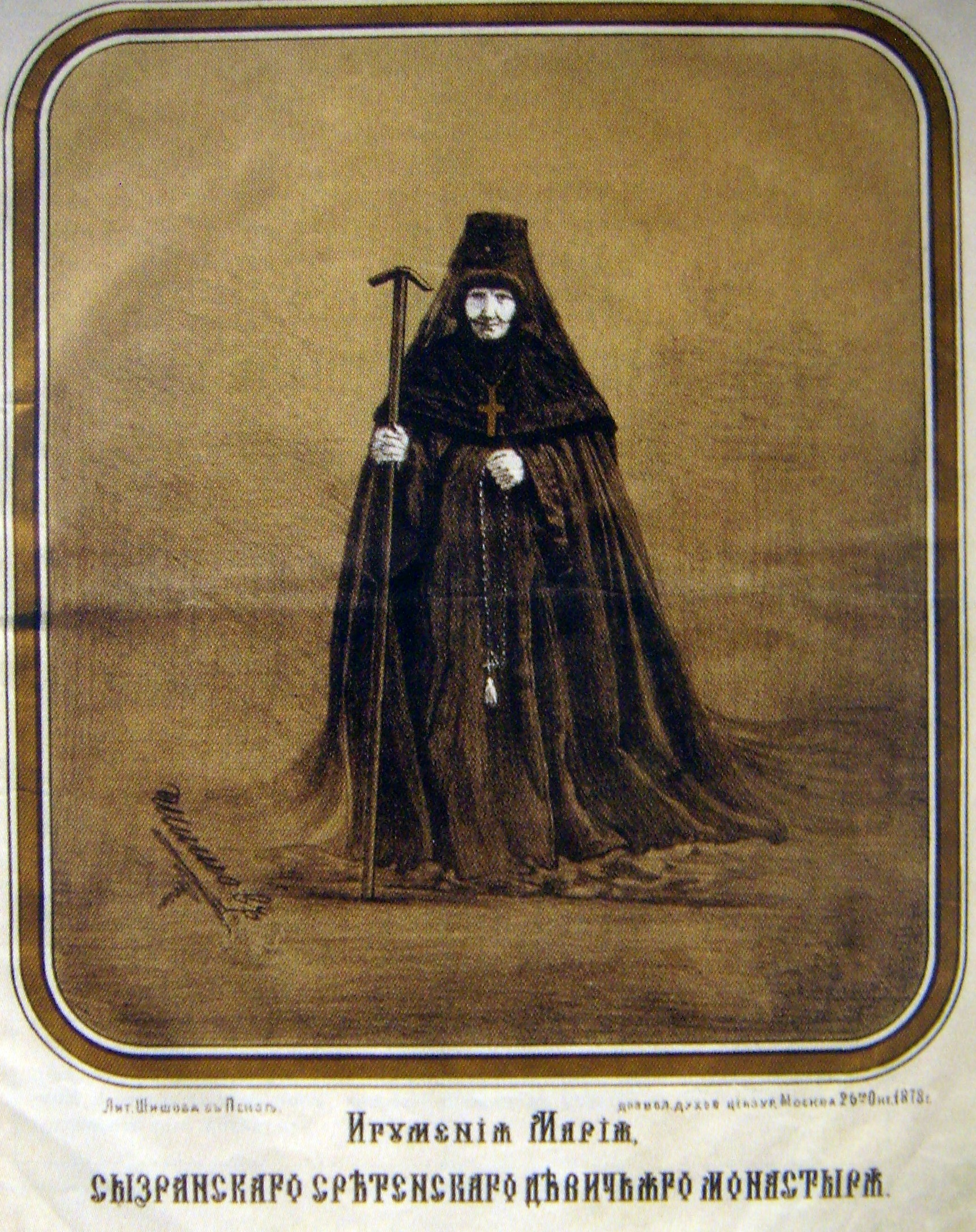 Мария (Лидия Никитина), первая настоятельница Сызранского Сретенского женского монастыря